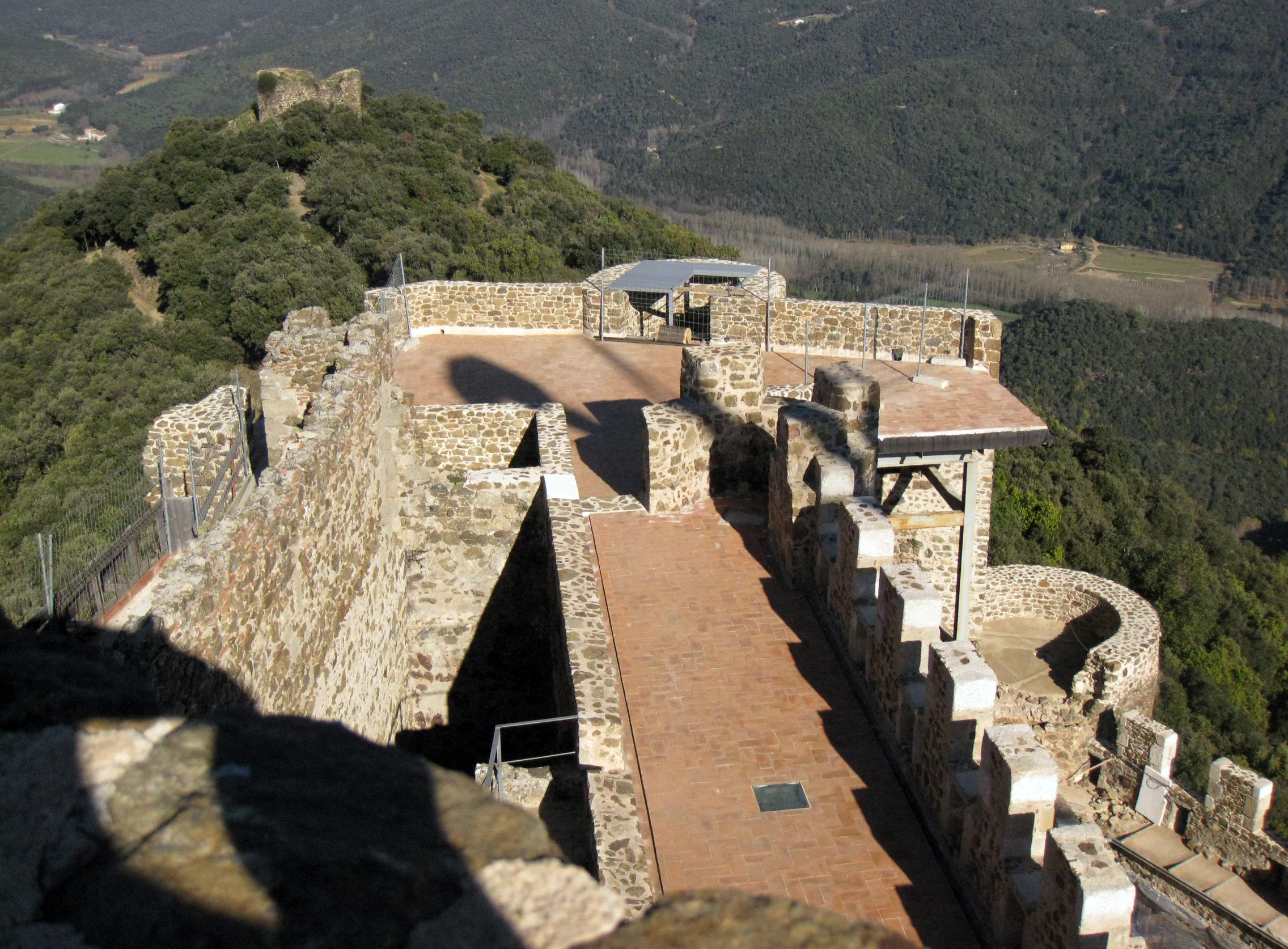 Castell de Montsoriu (Arbúcies i Sant Feliu de Buixelleu) Object location41° 46′ 59.91″ N, 2° 32′ 26.17″ E